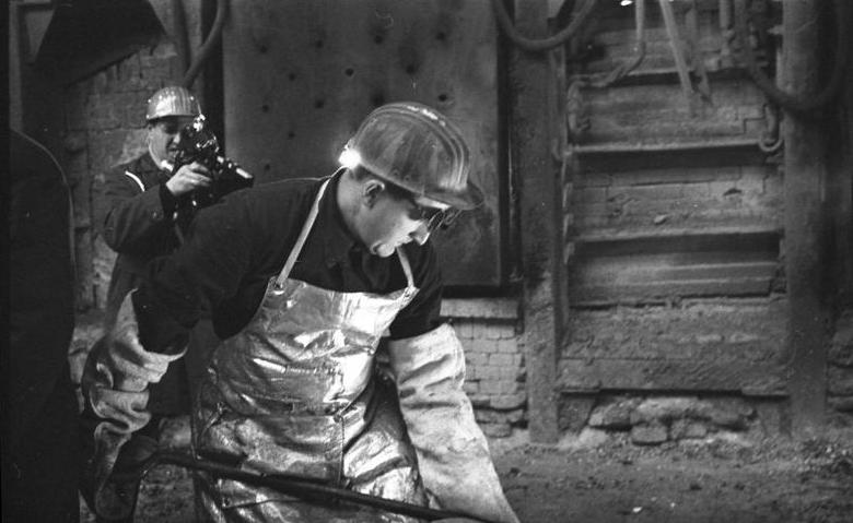 Pakistanischer Staatspräsident Ayoub Khan zu Besuch in der Henrichshütte der Ruhrstahl AG. in Hattingen